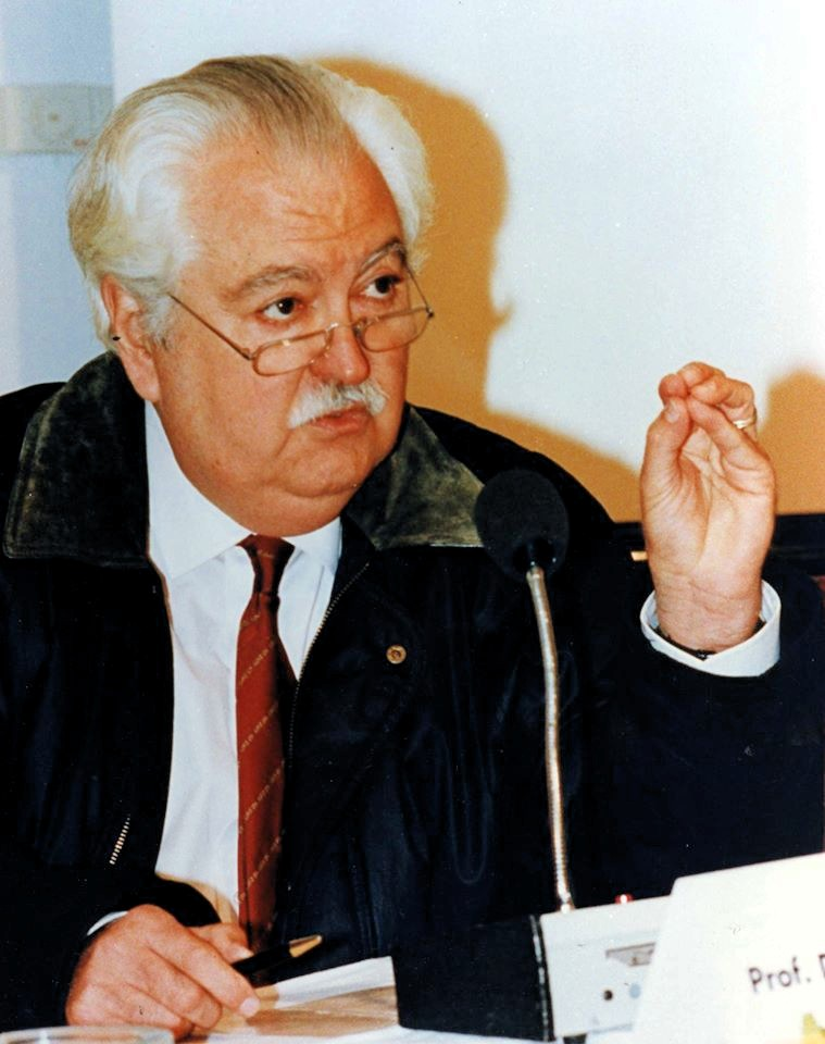 En una conferencia de un congreso